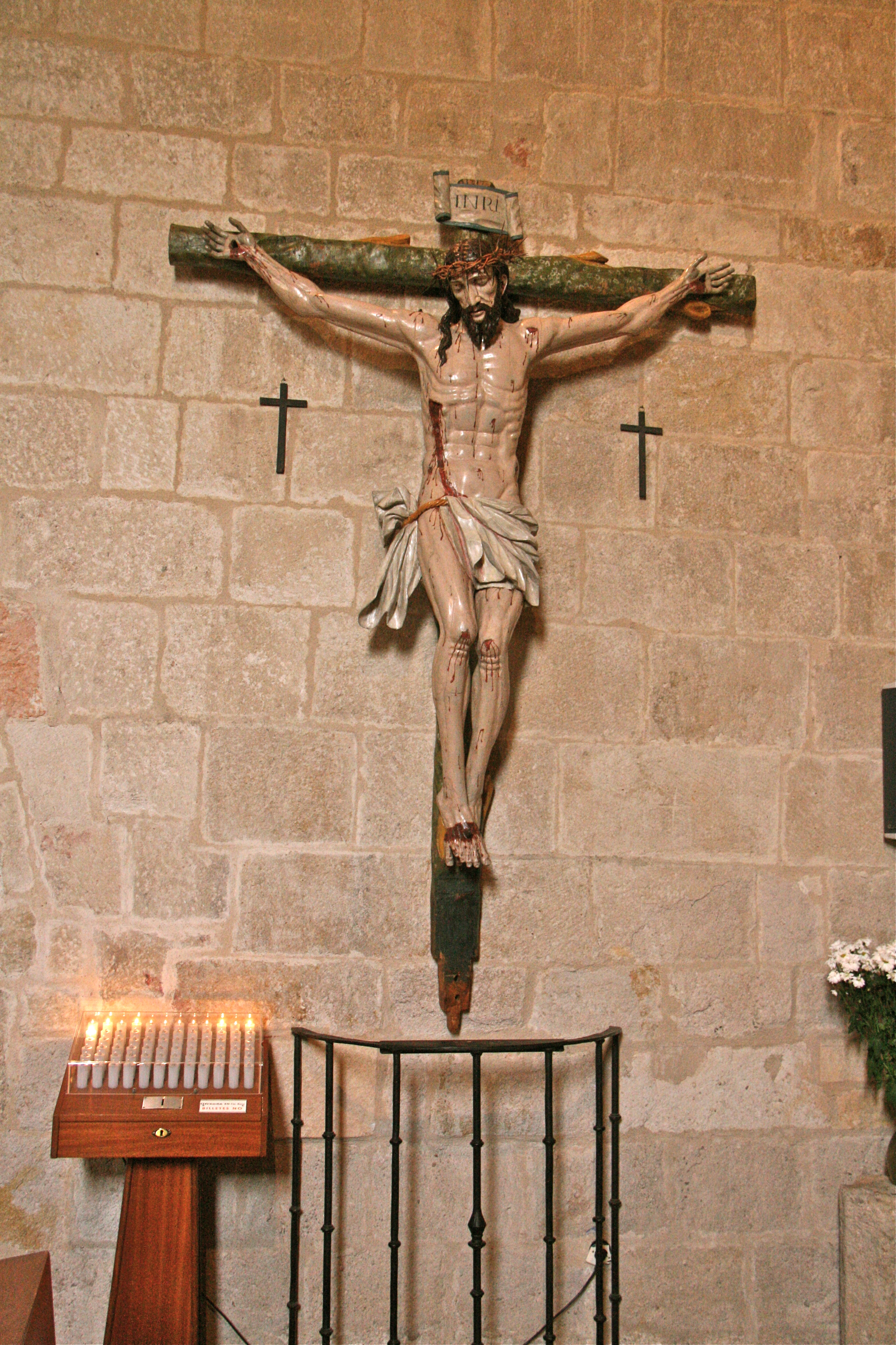 Santísimo Cristo del Amparo Crucificado - Iglesia de San Claudio de Olivares (Zamora)